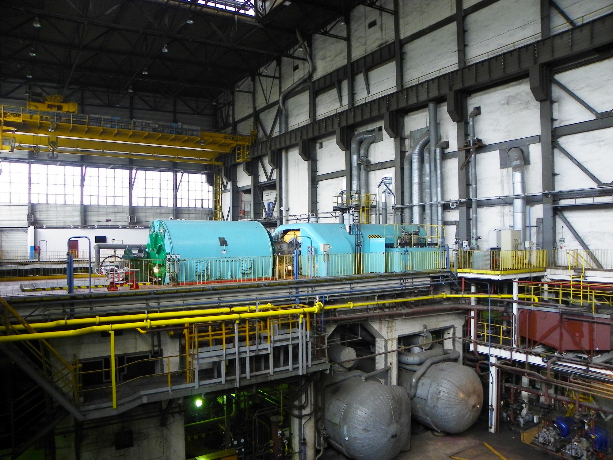 Turbozespół bloku BC50.